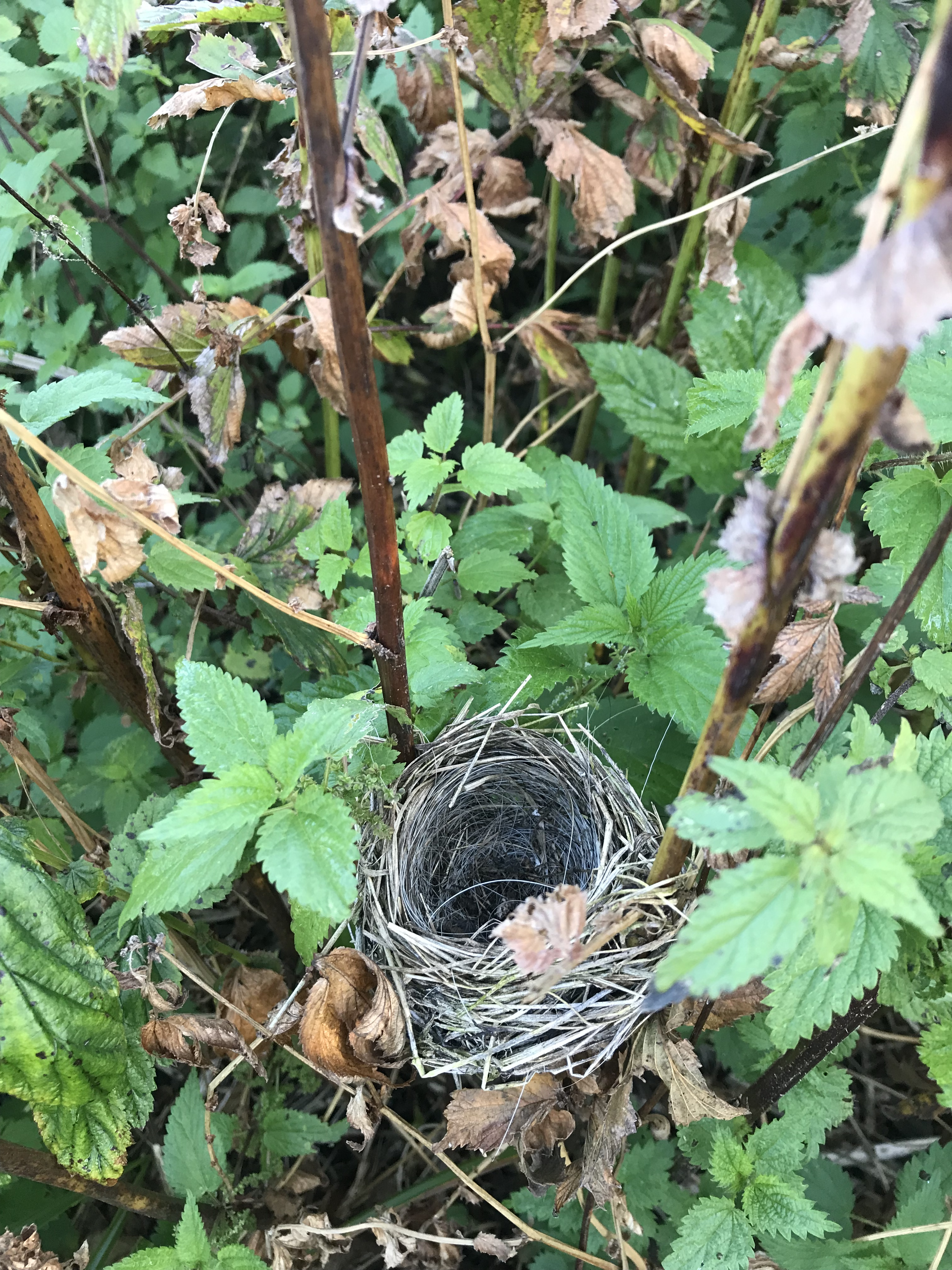 Verlassenes Nest des Sumpfrohrsängers am Ende der Brutperiode, etwa Mitte September